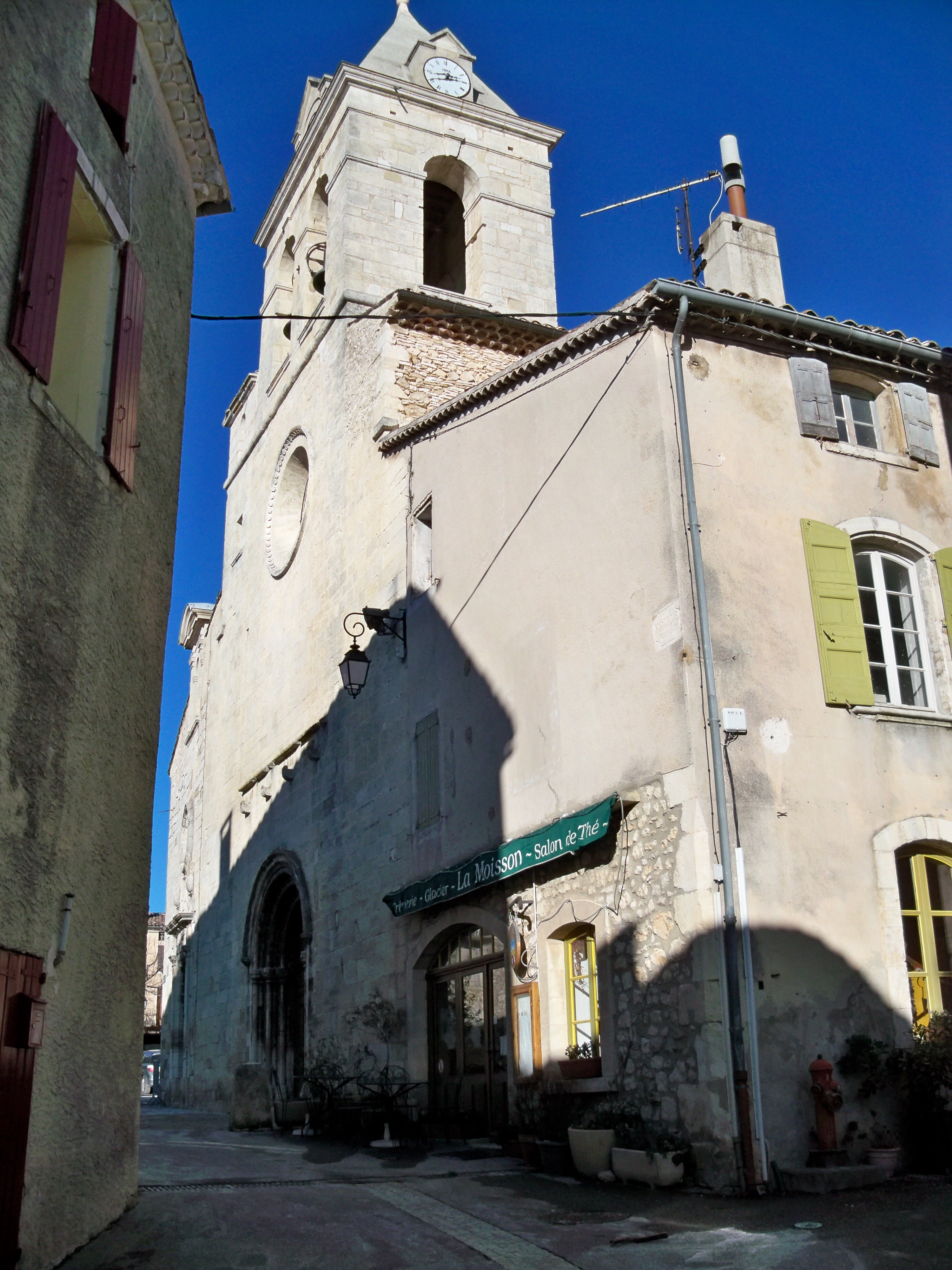 église d Sault (Vaucluse, France)